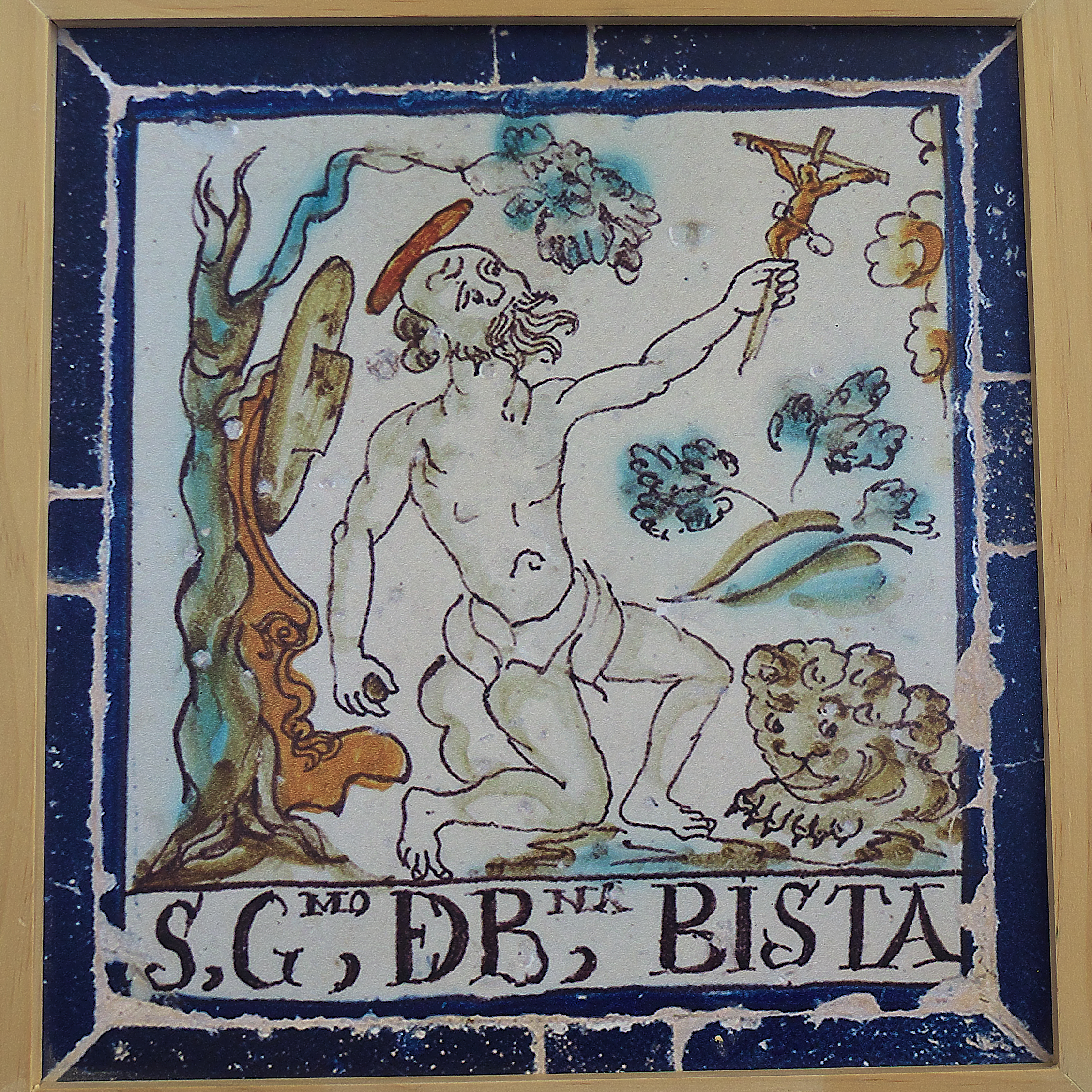 El Monasterio de San Jerónimo de Buenavista disponía de un importante patrimonio en la ciudad de Sevilla y otras poblaciones, gracias a donaciones privadas, eclesiásticas y reales; haciendas, ganados, labores, rentas, y también fincas urbanas, señaladas con azulejo de propio (1600-1650). El azulejo, con espléndido dibujo de la imagen de San Jerónimo Penitente de Torrigiano